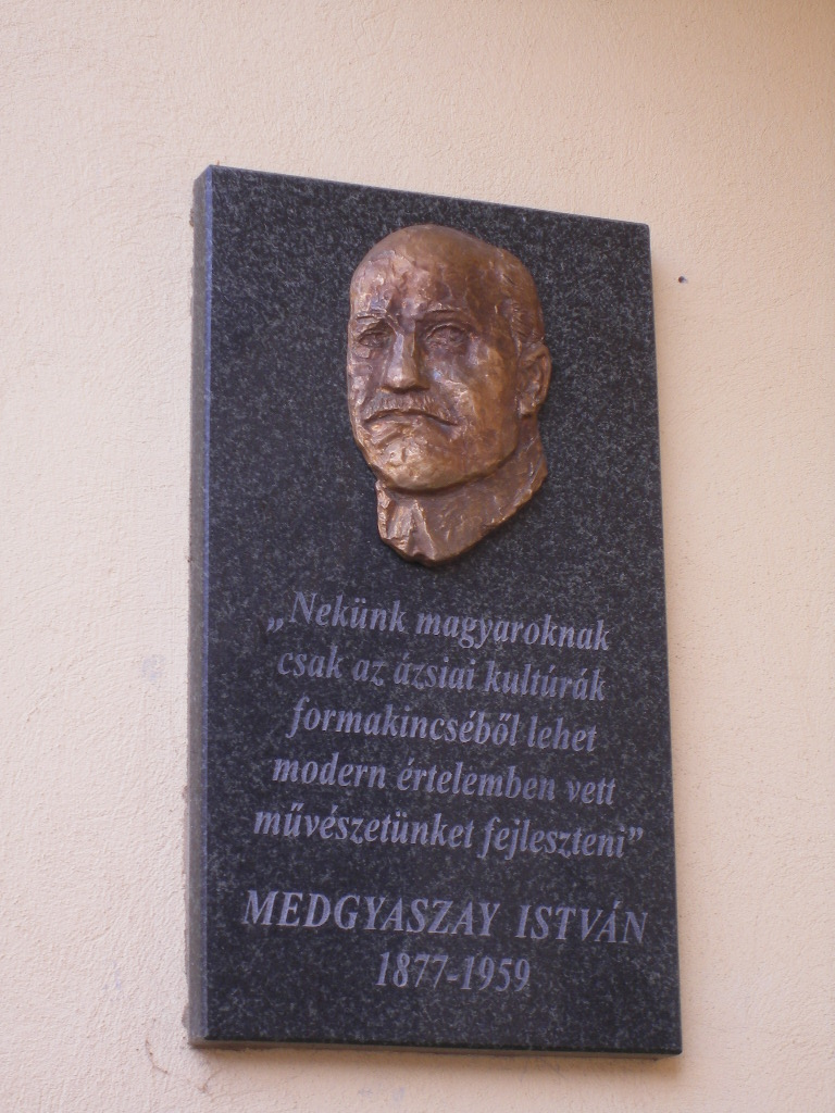 Komárom - Medgyaszay István emléktáblája az Európa-udvarban